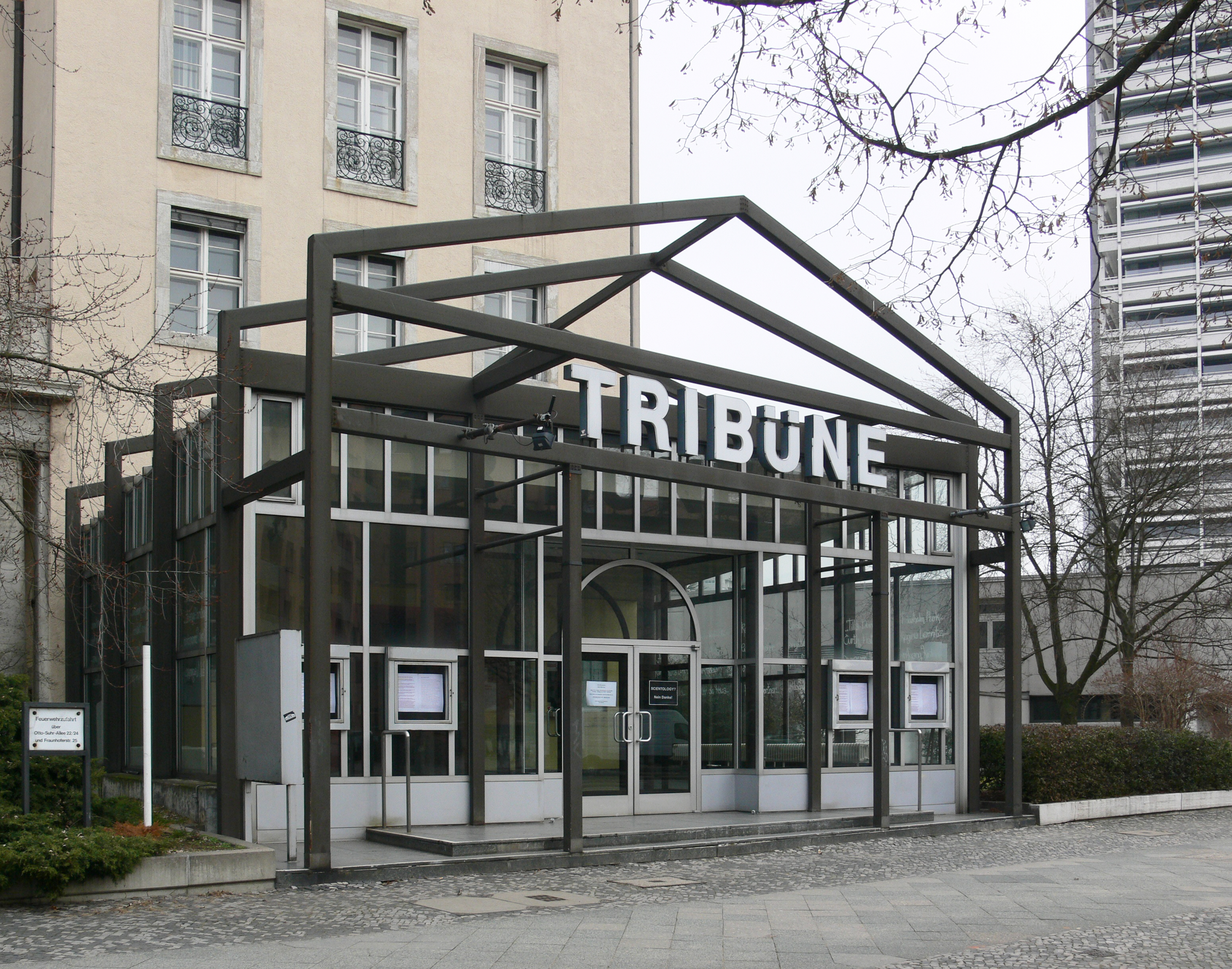 Das 2008 geschlossene Theater "Tribüne", Otto-Suhr-Allee, im Februar 2009